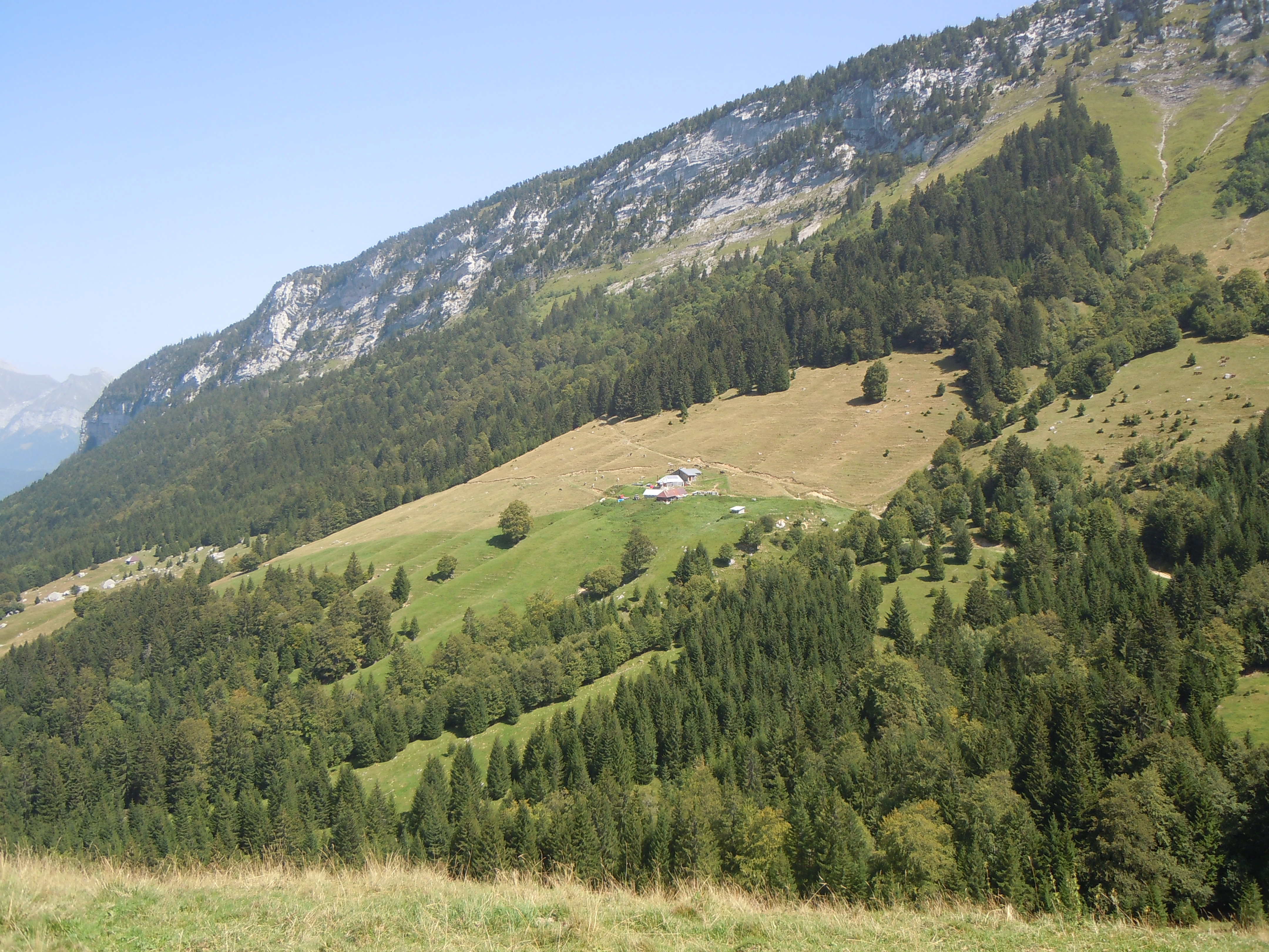 Les Ailes du Nant - Montagne du Charbon - depuis le Mollard - Massif des Bauges - Haute-Savoie